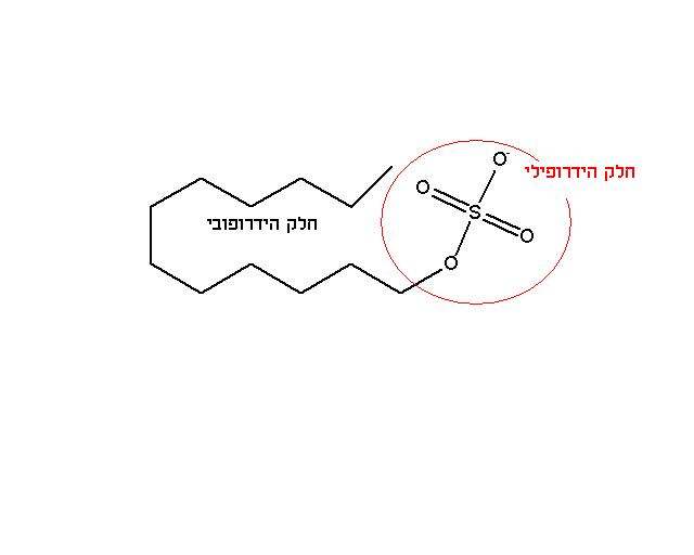 דוגמה למולקולה אמפיפטית